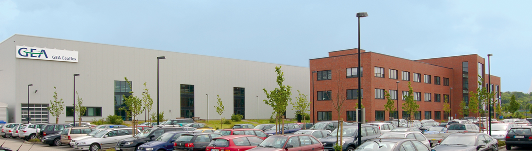 Außenansicht des Firmengebäudes der GEA Ecoflex, seit 2015: Kelvion.